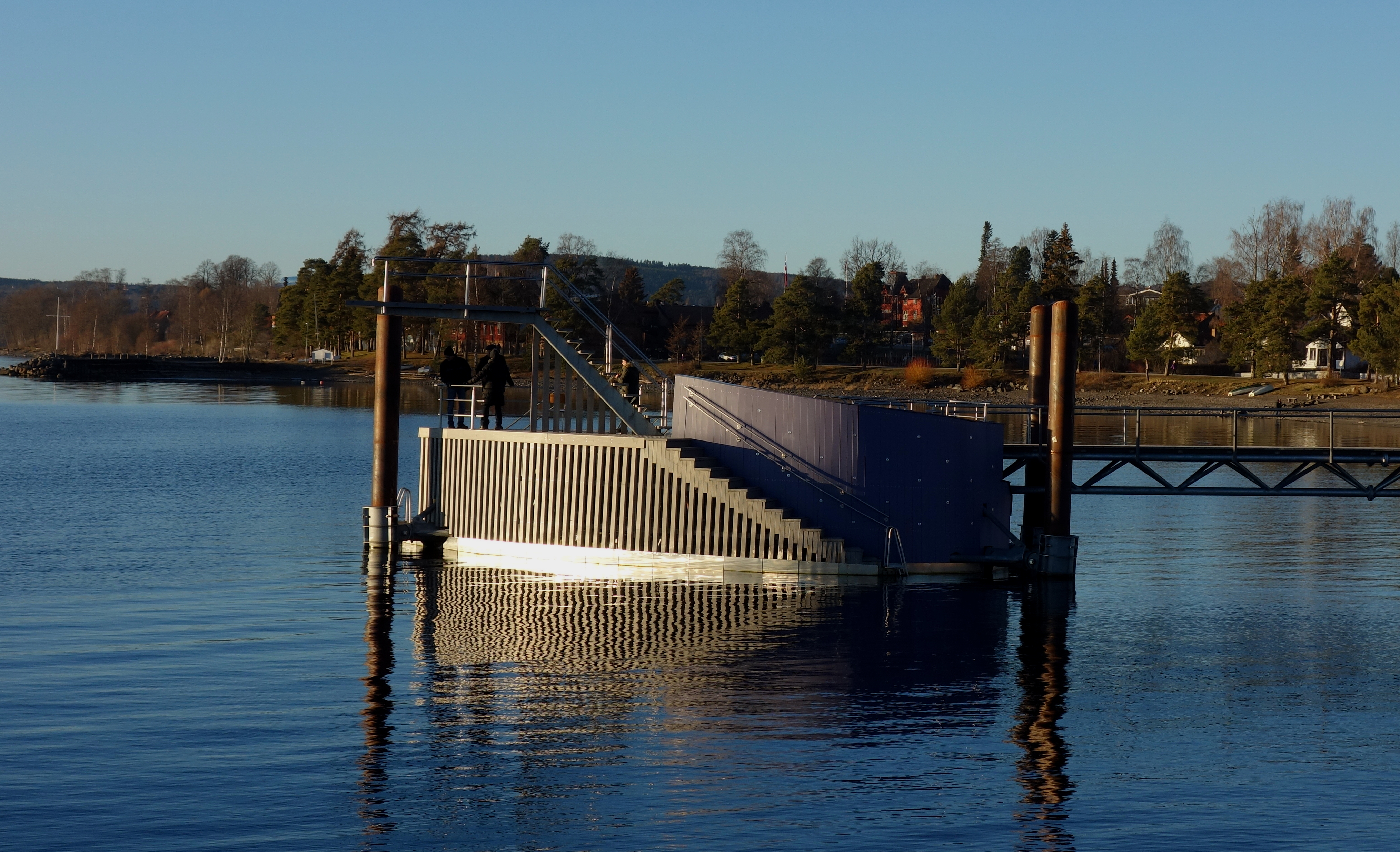 Stupetårnet på Hamar